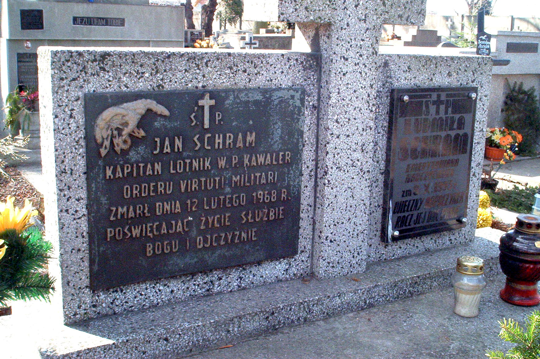 Epitafium Jana Schrama